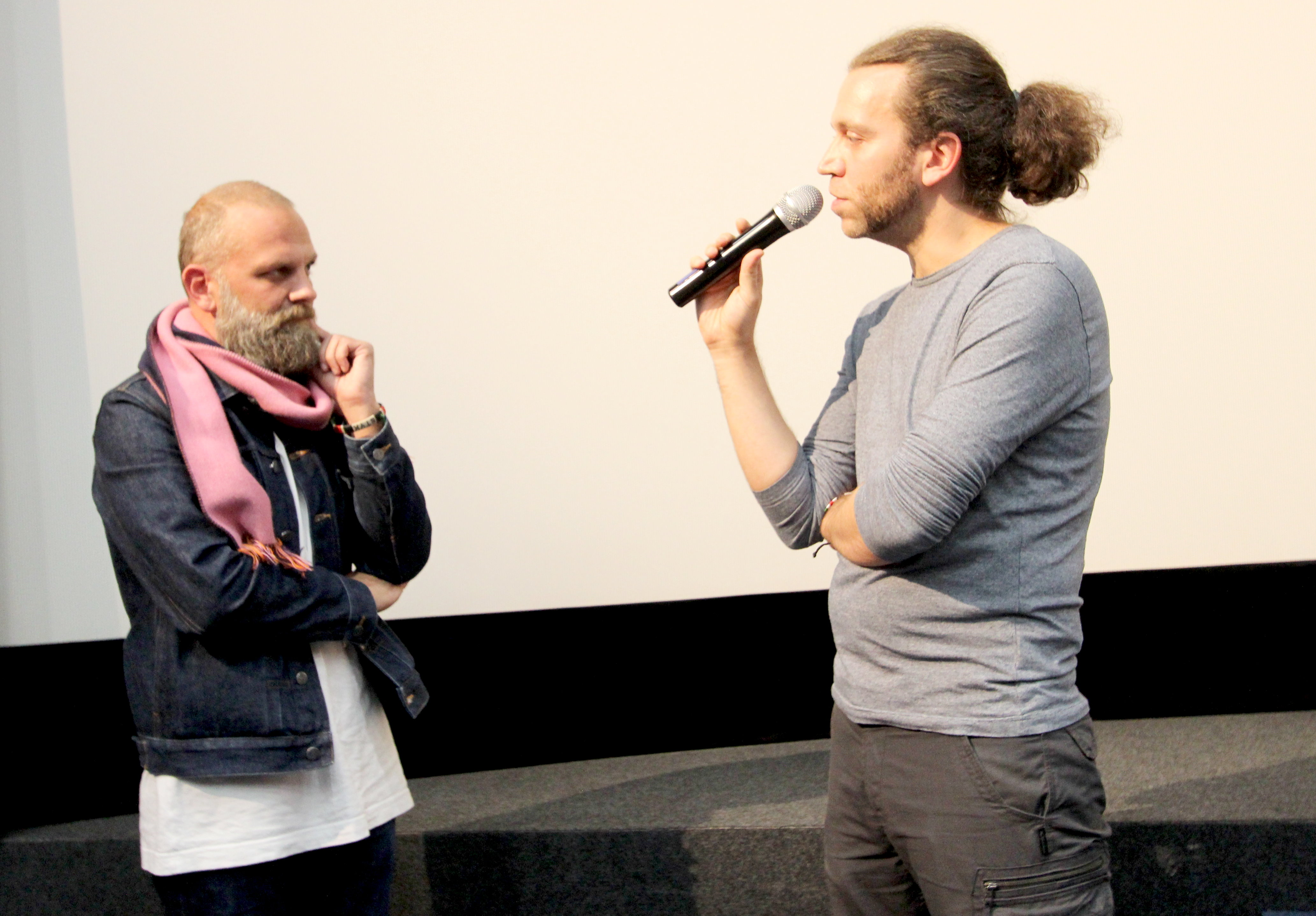 Geboren 1970 in Wien. Er studierte von 1990 - 1995 Psychologie und Malerei an der Universität Wien sowie von 1994 - 1996 Film und Video an der Kunstakademie Düsseldorf bei Nan Hoover. Anschließend absolvierte er von 1996 bis 2001 ein Film- und Fernsehstudium an der Kunsthochschule für Medien in Köln. Aufnahme von 2018.